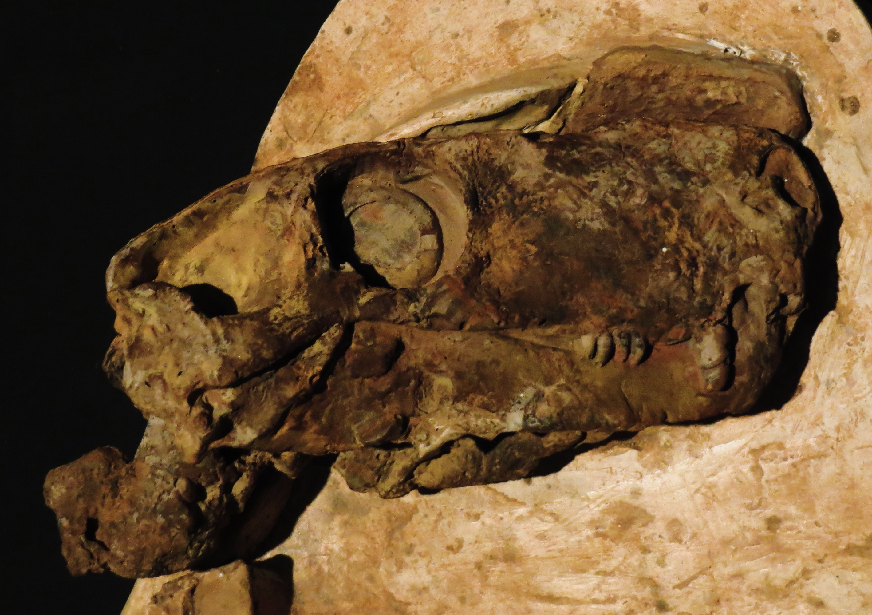 Fossil of Vjatkogorgon, an extinct therapsid- Took the picture at Dinosaurium, Prague